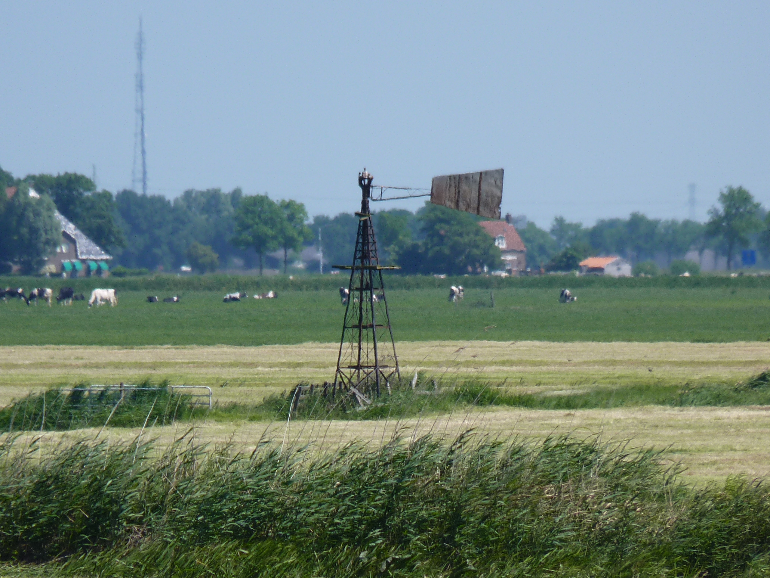 Britswerd Windmotor 2010